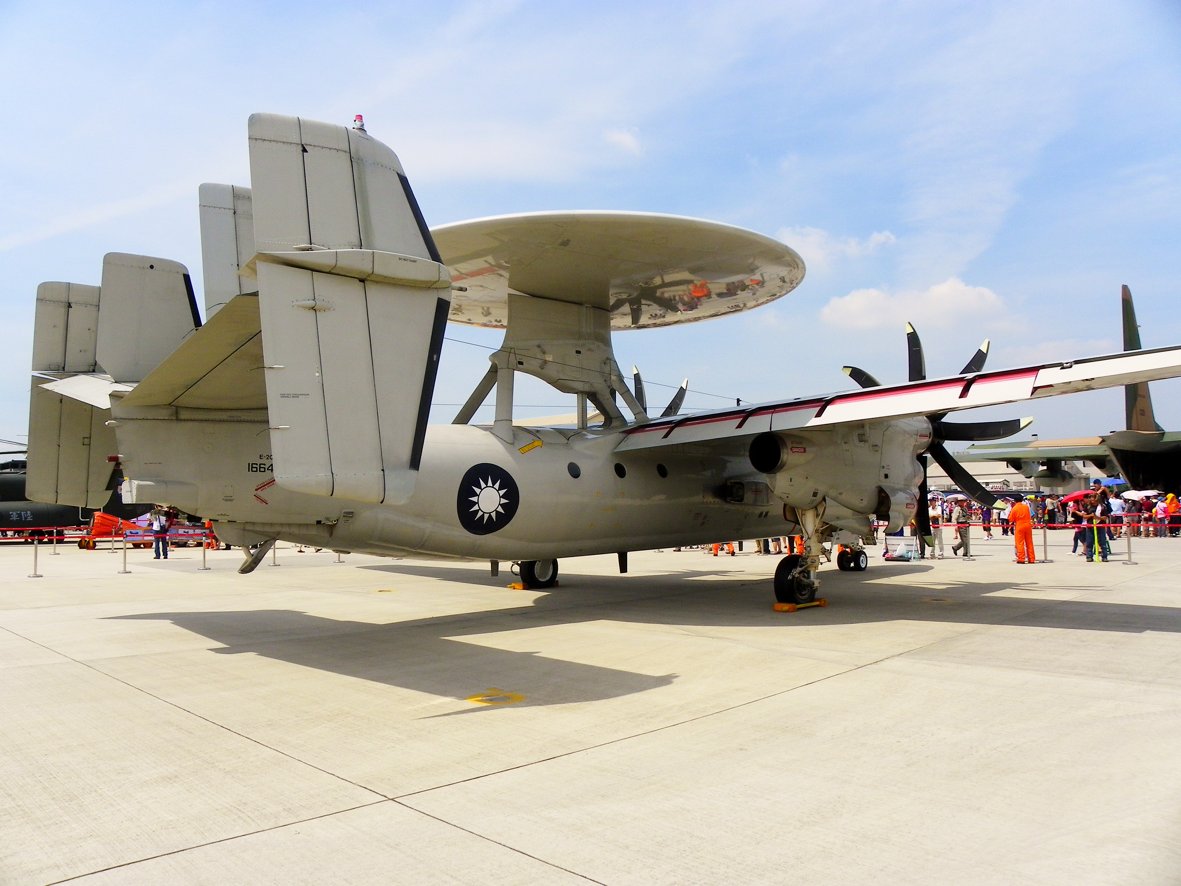 由斜後方所見E-2K早期預警機，攝於2011年8月13日空軍松山基地營區開放活動。